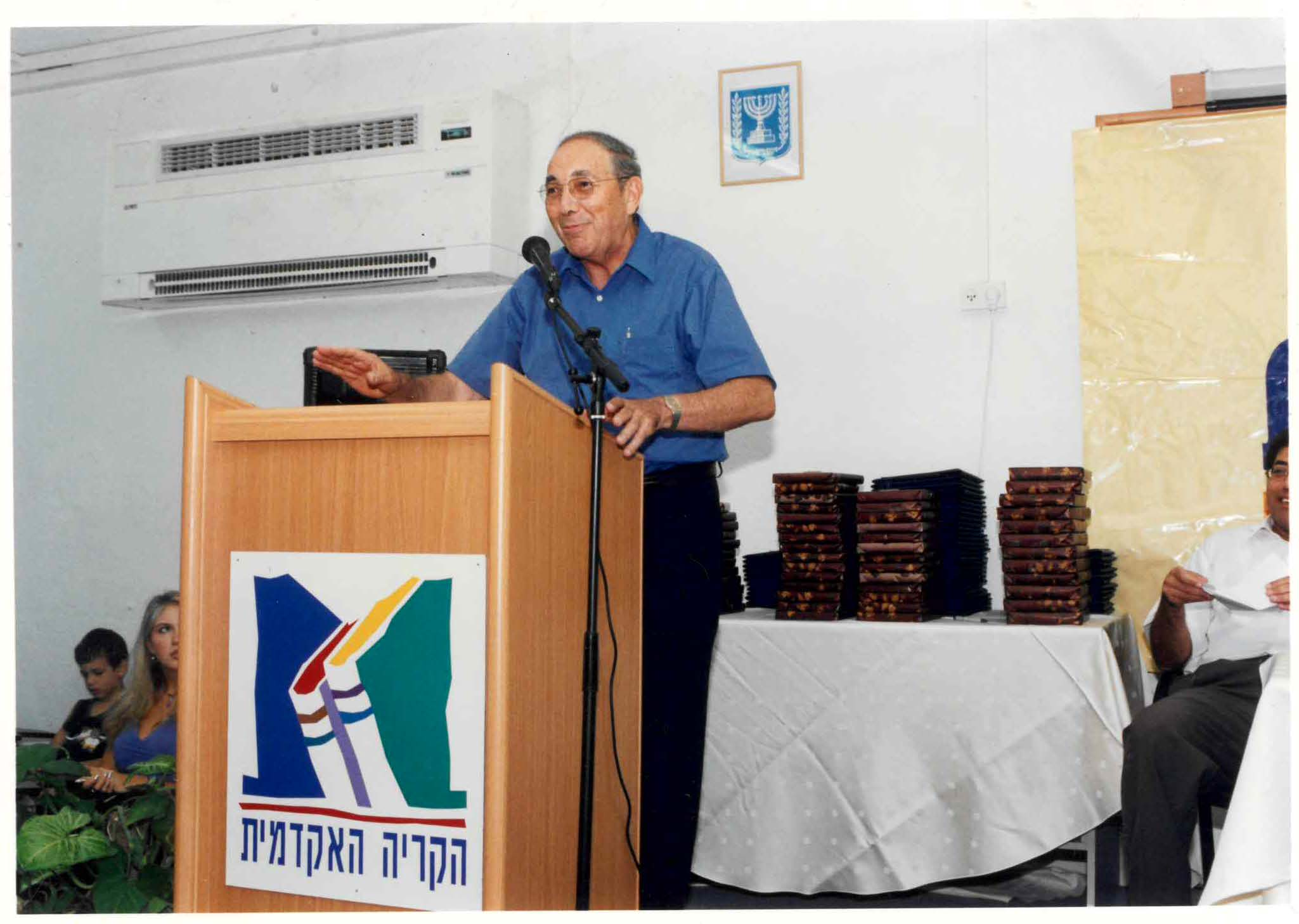 פרופ' מרשל סרנת